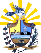 Escudo del municipio Padre Pedro Chien. Estado Bolívar. Venezuela